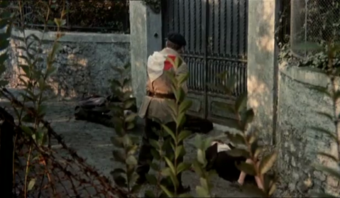 Filmkocka a Mussolini végnapjai című filmből